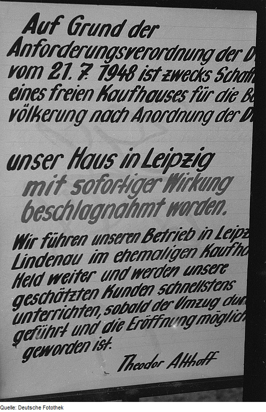 Original image description from the Deutsche Fotothek Anschlag zur Enteignung des Kaufhauses Althoff